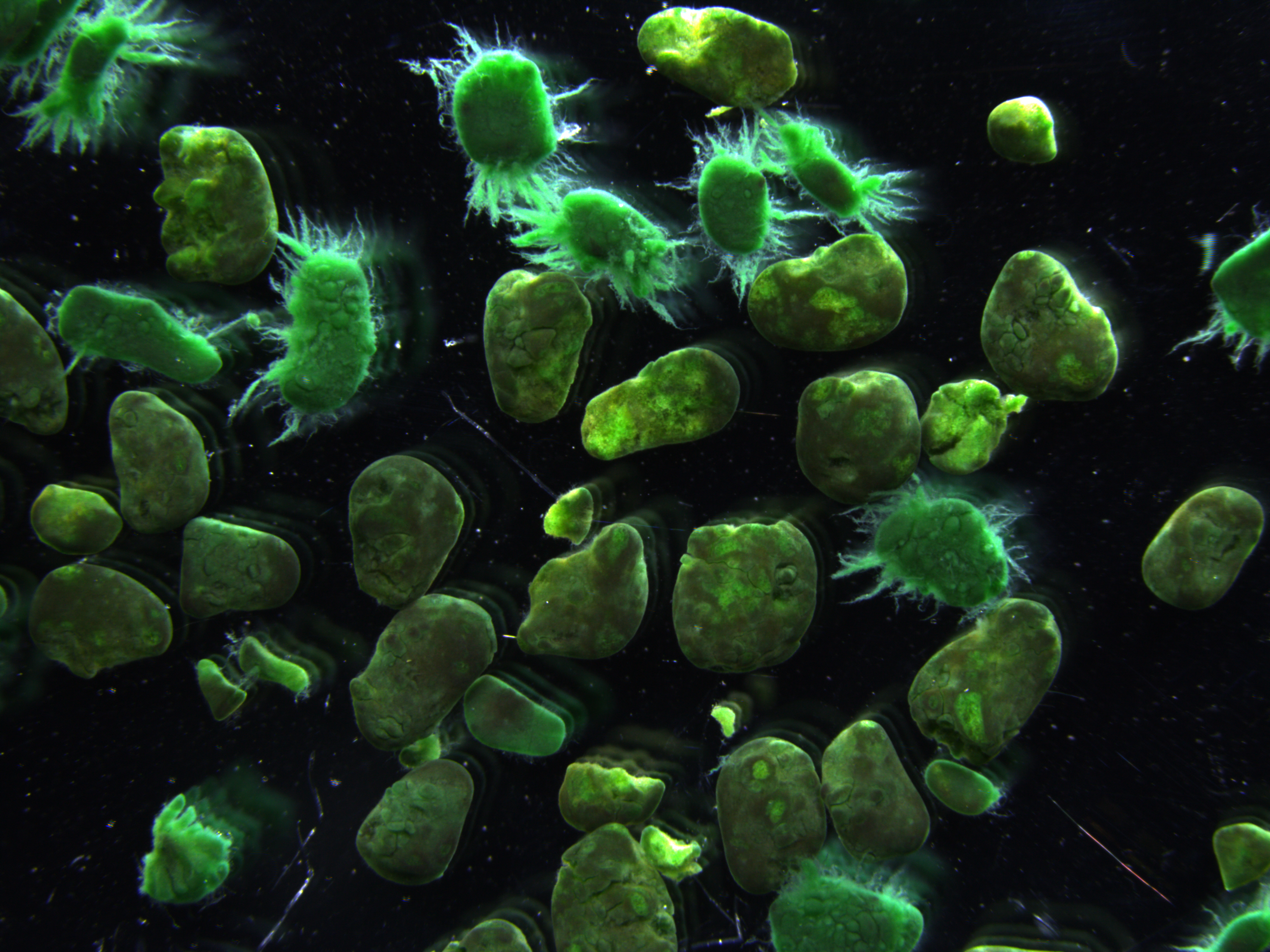 Oxygenic photogranules from a SBR reactor.